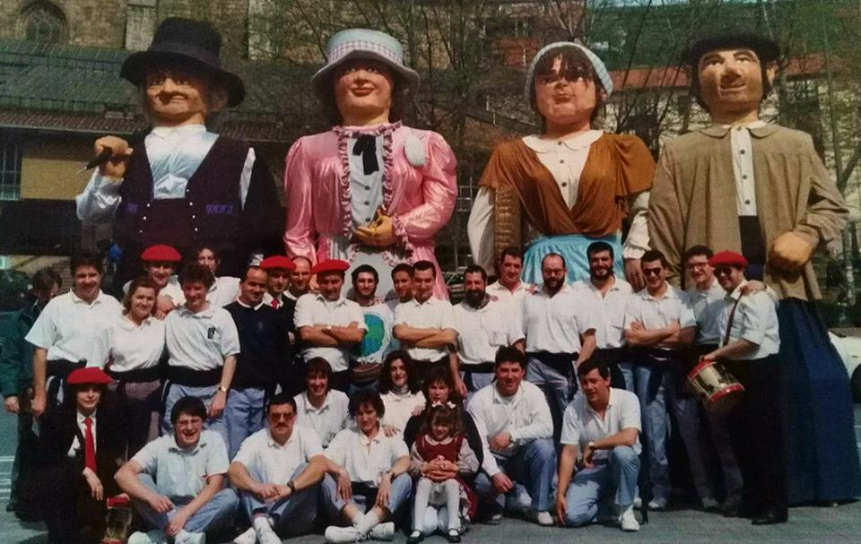 Mairuek deustu